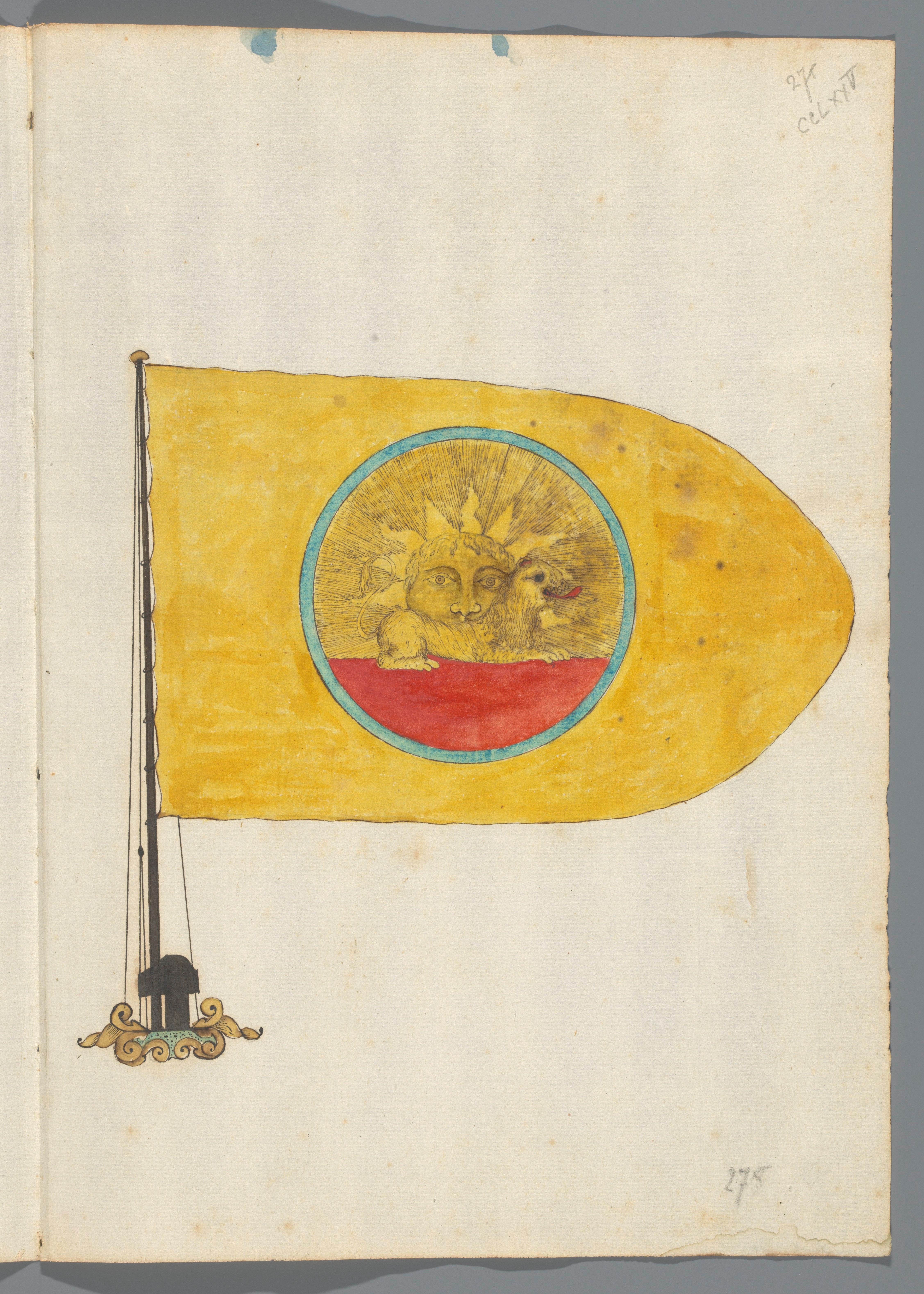 IdentificatieTitel(s): Blad uit een vlaggenboek met vlaggen uit Europa, Noord-Afrika, Nabije en Verre Oosten, voorstellende de vlag van PerziëObjecttype: tekening Objectnummer: NG-2018-301-138Omschrijving: Tekening van de vlag van Perzië in polychromie. Midden op het gele veld bevindt zich in het midden een blauwomrande cirkelvormige afbeelding van een gloeiende gele zon (met gezicht) met ervoor een naar rechts gewende gele leeuw met rode tong op een rode ondergrond. De vlag is gehezen in een scheepsvlaggenmast. De vlag is aan de smalle uiterste zijde afgerond.VervaardigingVervaardiger: tekenaar: anoniemPlaats vervaardiging: Nederland (mogelijk)Datering: 1669 - 1670Materiaal: papier inkt waterverf Techniek: tekenenAfmetingen: h 265 mm × b 190 mmVerwerving en rechtenCredit line: Aankoop uit het Johan Huizinga Fonds/Rijksmuseum FondsVerwerving: aankoop 5-apr-2018Copyright: Publiek domein